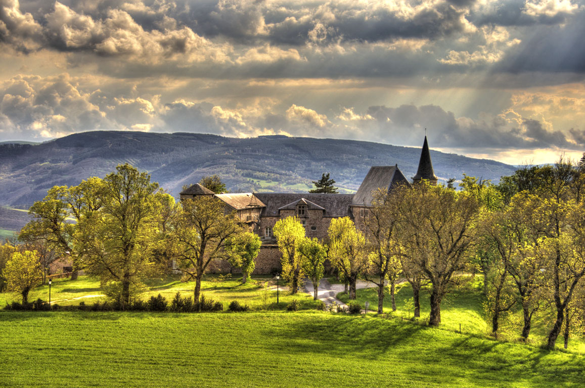 Château de Gissac (Aveyron, France).